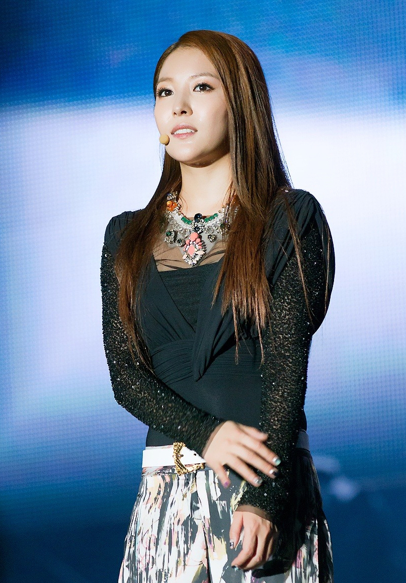 120818-sm콘서트보아